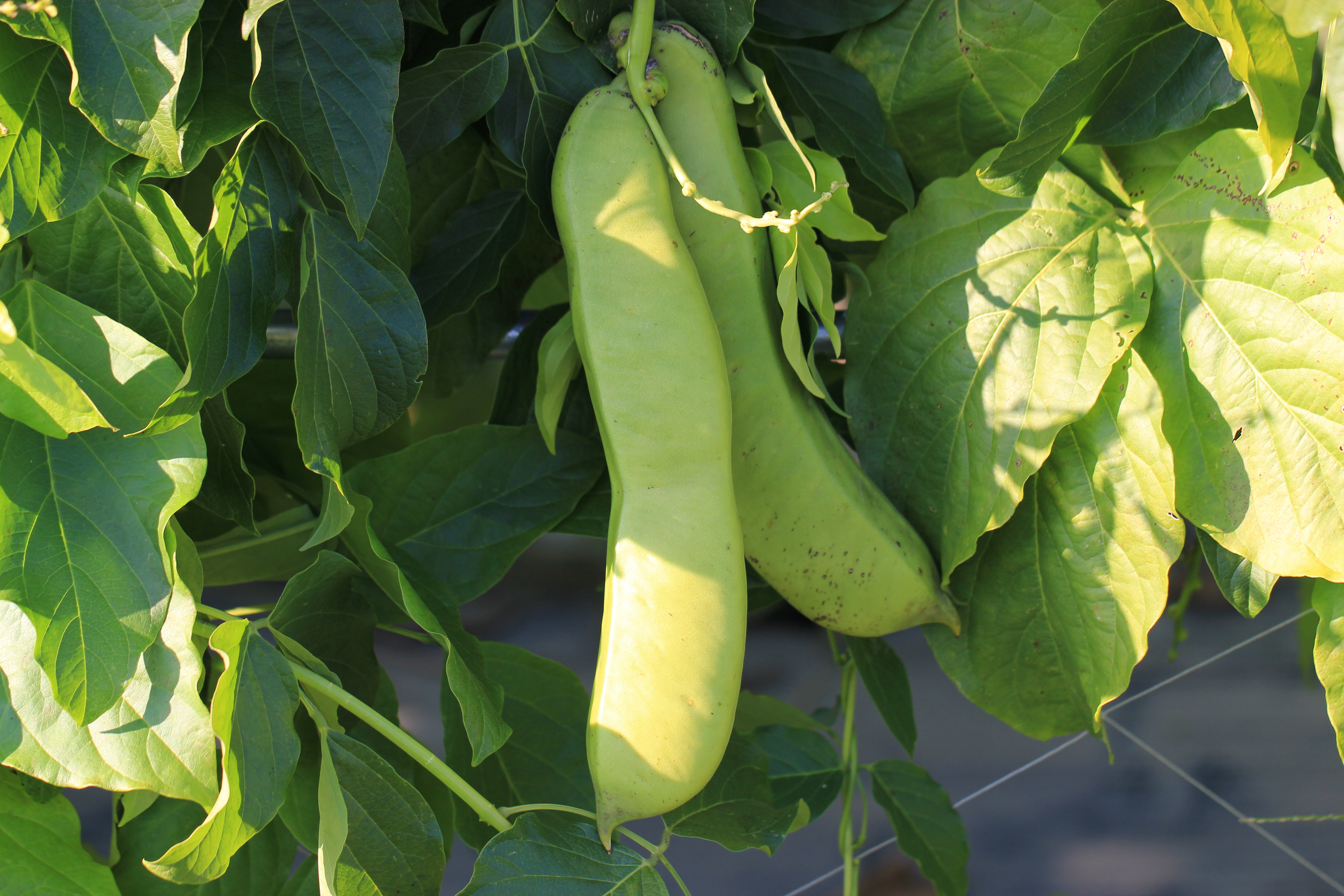 Canavalia gladiata 丹波市こやま園農場